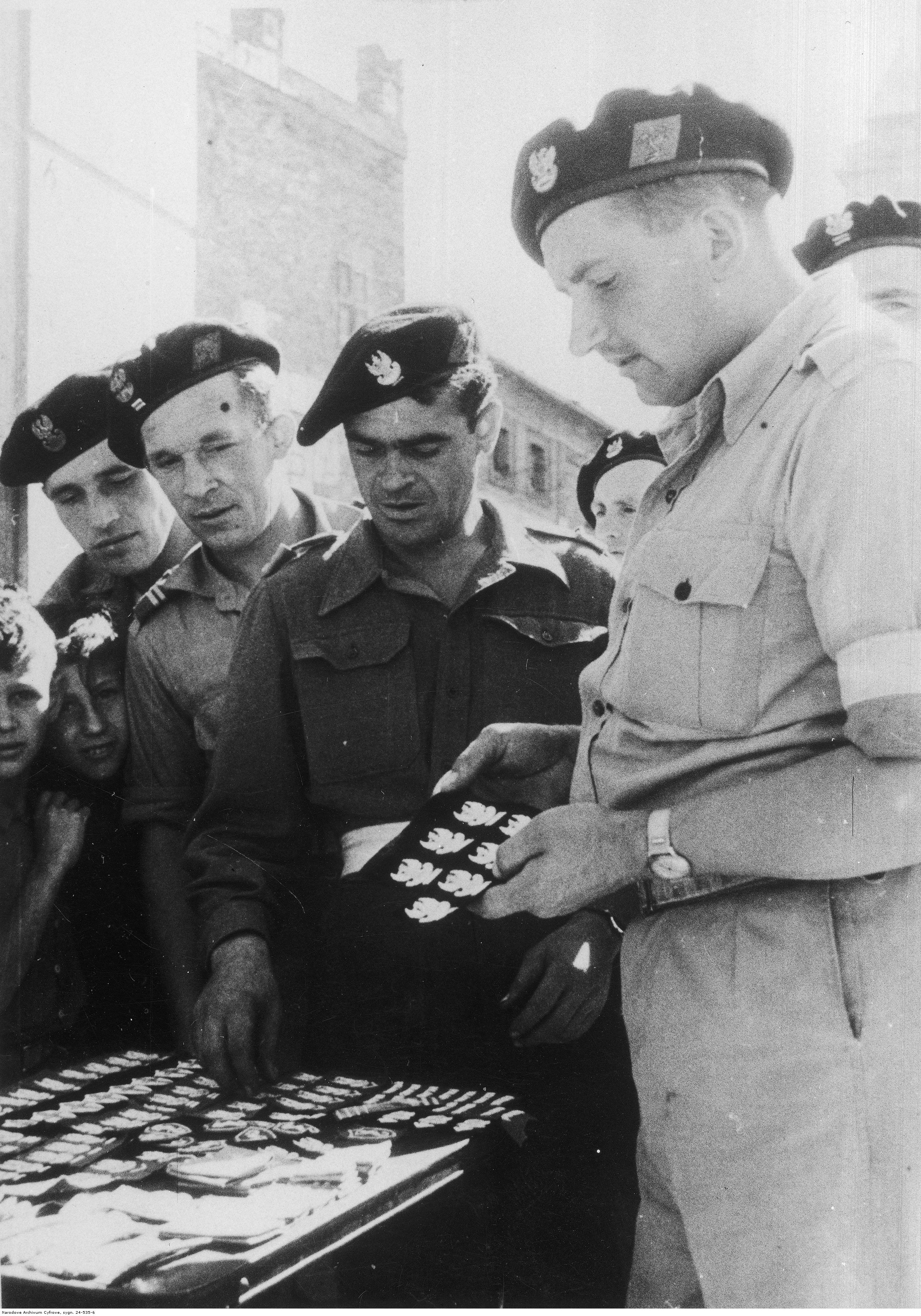 Żołnierze 4 Pułku Pancernego pobierają nowe orły wojskowe, oznaki rozpoznawcze i specjalne 2 Korpusu Polskiego. Archiwum Fotograficzne Tadeusza Szumańskiego. Sygnatura: 24-535-6